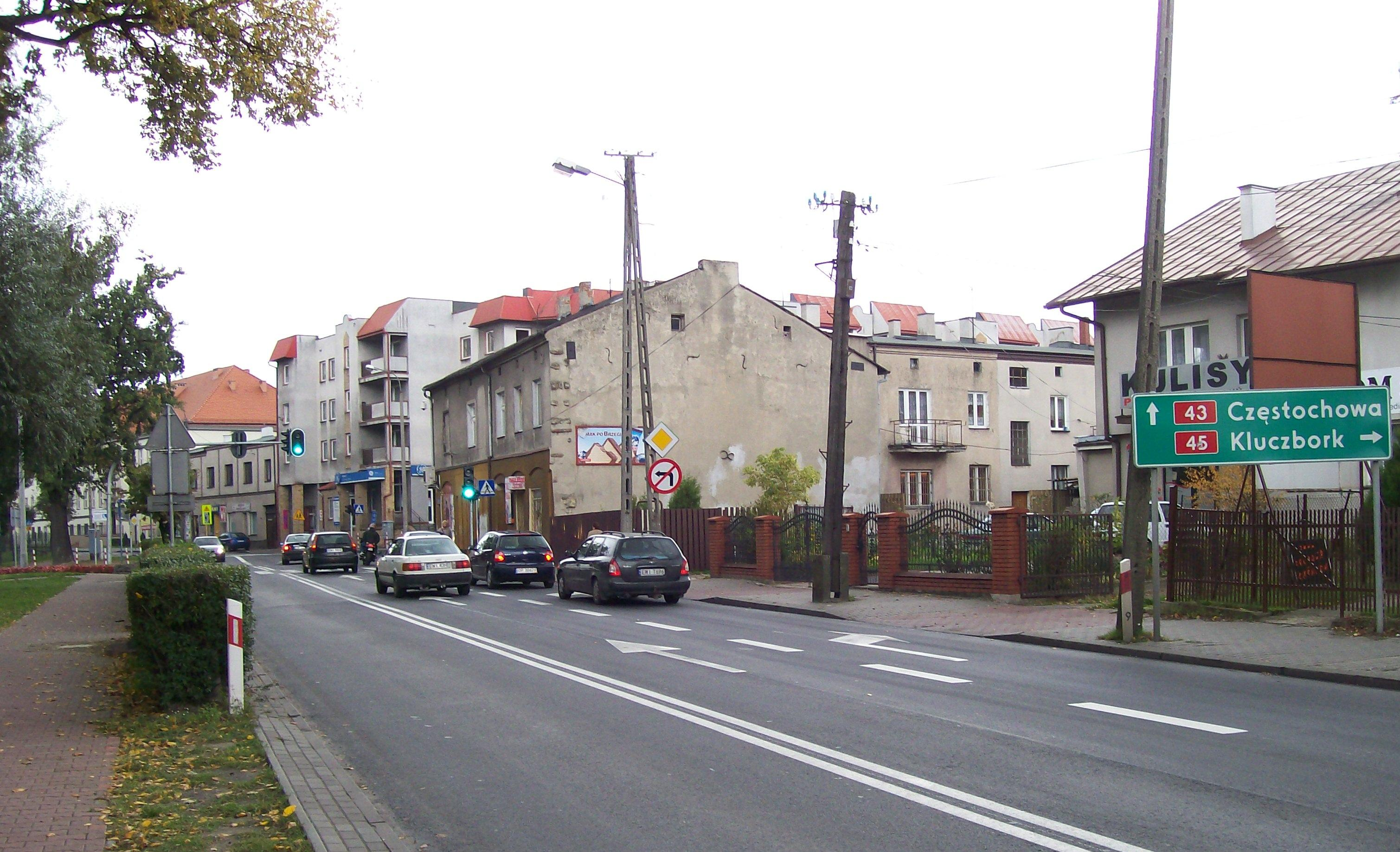 Fragment ulicy Kopernika (DK45) w Wieluniu - w okolicy skrzyżowania z ulicą Śląską i Piłsudskiego (DK43)